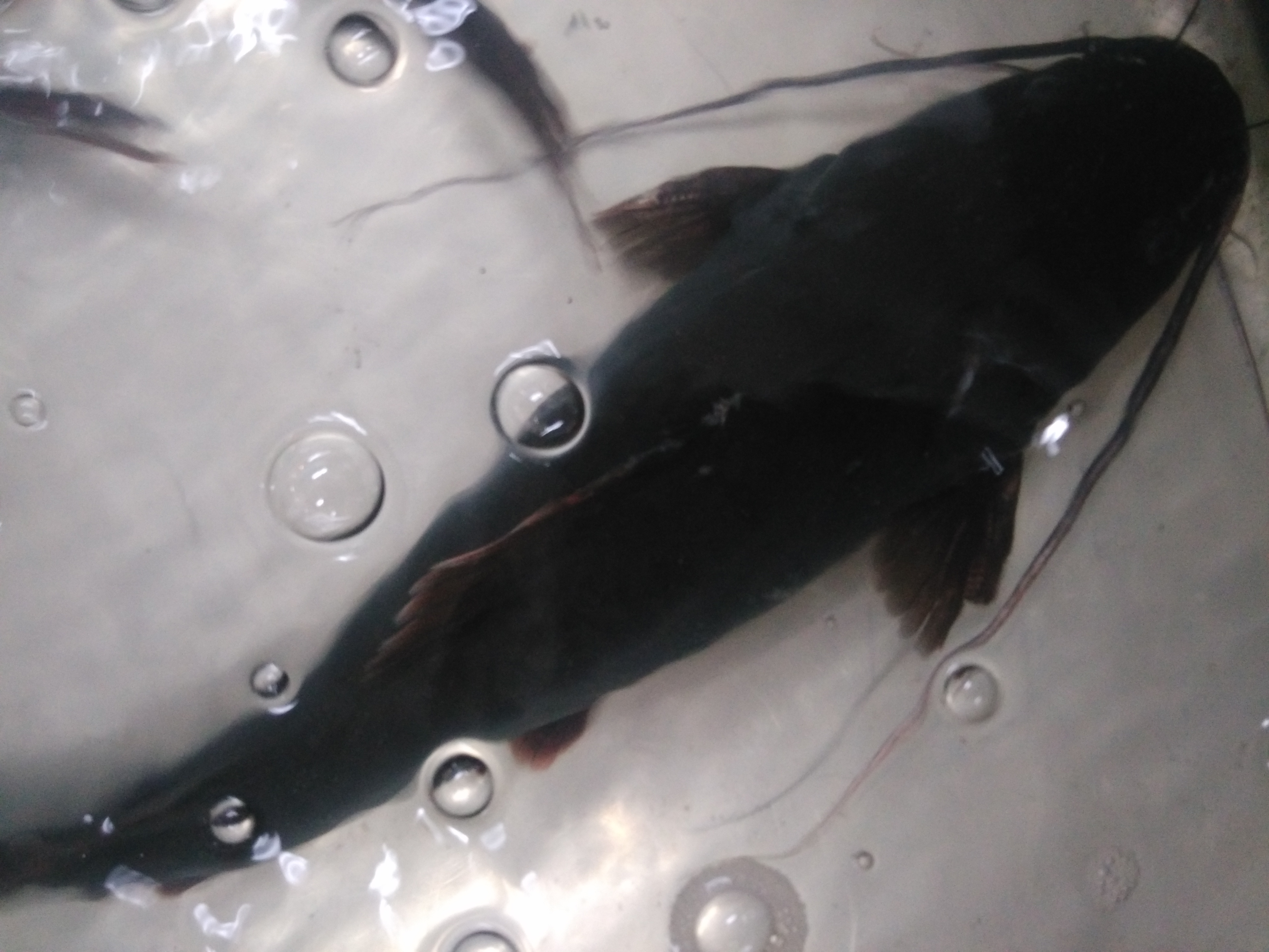 Hình tự chụp bằng máy cá nhân